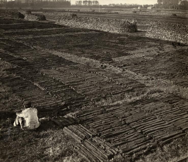 Collectie SPAARNESTAD PHOTO/Het Leven/Fotograaf onbekend, SFA022809009 Turfwinning. Turfproduktie bij Rotterdam. "De versche turfrepen van vier turven elk worden voor de eerste droging op het land uitgespreid." Een veenarbeider geniet even van zijn rust. Foto 1918. Cutting peat. Making peat in an area near Rotterdam, Lines of fresh peat lying to dry. The Netherlands, 1918. Collectie Spaarnestad Voor meer informatie en voor meer foto’s uit de collectie van Spaarnestad Photo, bezoek onze Beeldbank: U kunt ons helpen onze kennis van de fotocollecties te verrijken door tags en commentaren toe te voegen. Herkent u mensen of locaties of heeft u een bijzonder verhaal te vertellen bij één van de foto’s, laat dan een reactie achter (als u ingelogd bent bij Flickr) of stuur een mailtje naar: You can help us gain more knowledge on the content of our collection by simply adding a comment with information. If you do not wish to log in, you can write an e-mail to